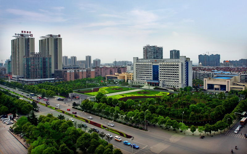 新修市府大楼